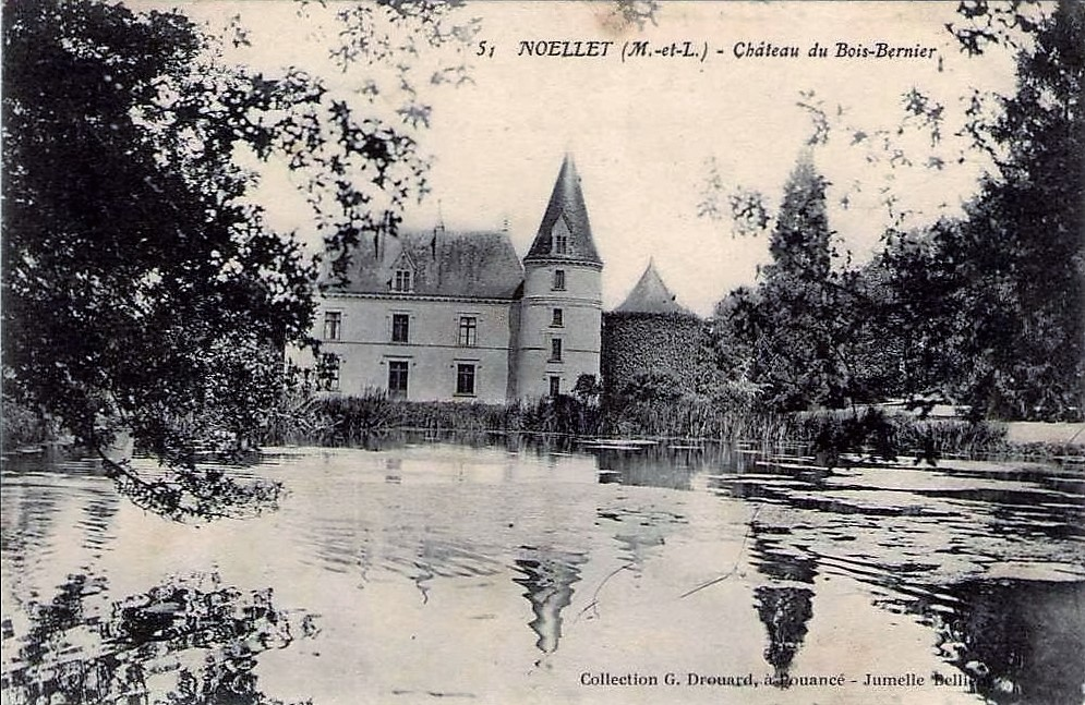 Carte postale - Noëllet - Château de Bois-Bernier dans le Maine-et-Loire